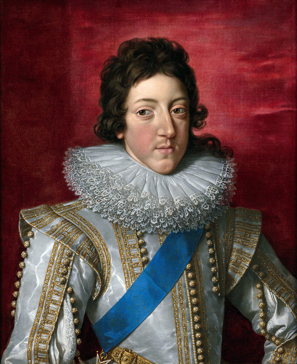 Louis XIII, King of France, with the Sash and Badge of the Order of Saint Esprit